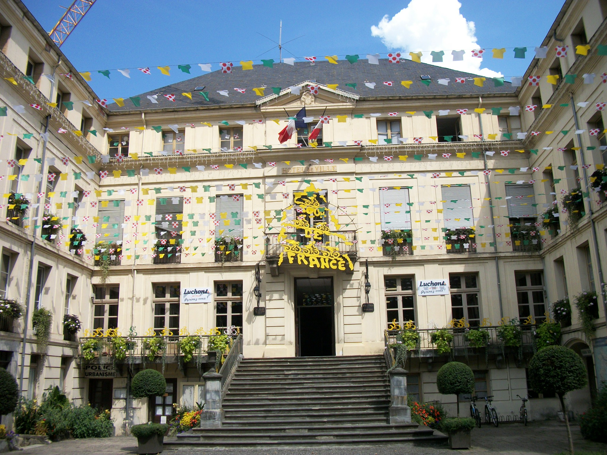 Mairie de Bagnères-de-Luchon aux couleurs du Tour de France en 2018